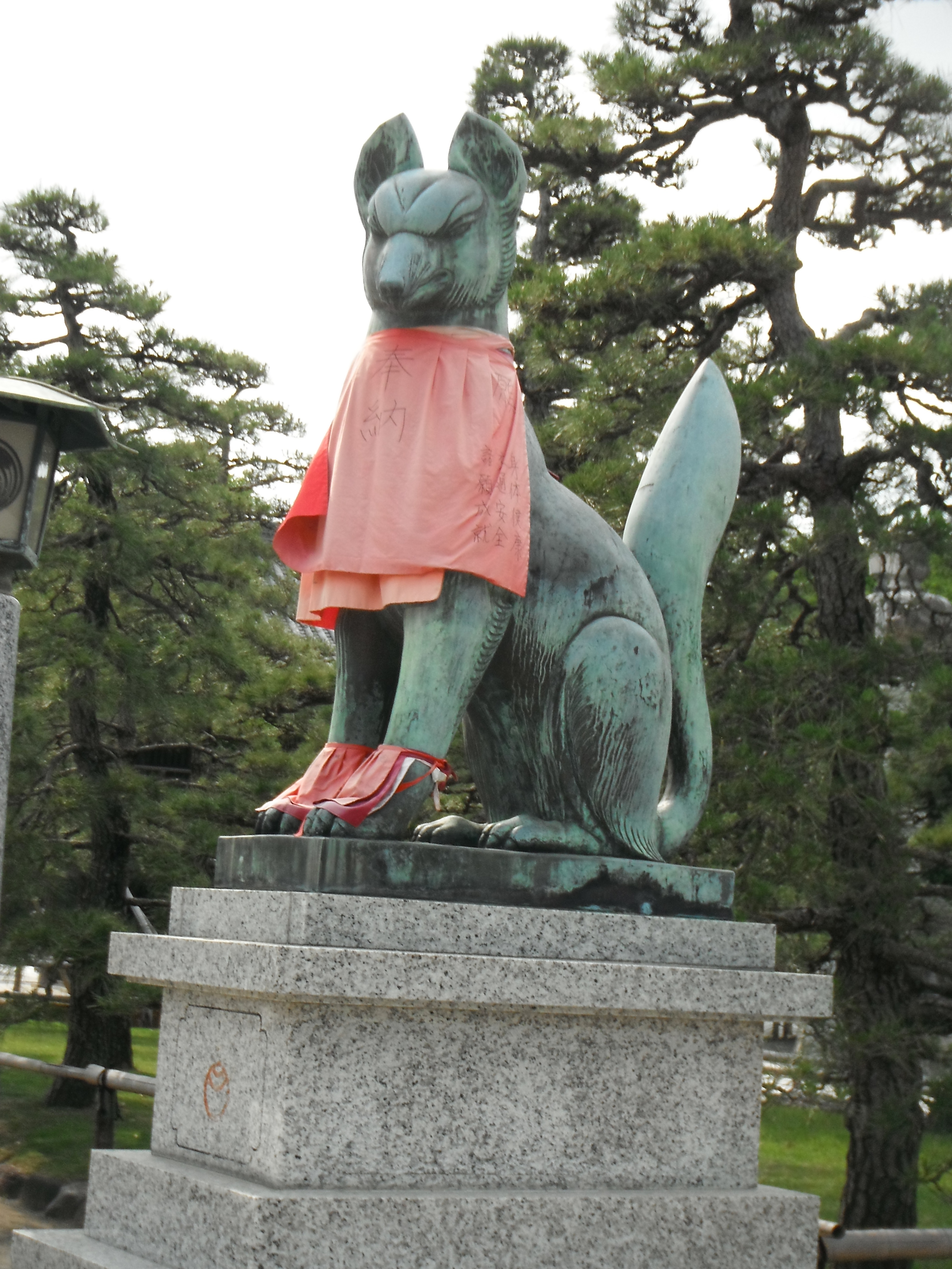 豊川稲荷 稲荷像